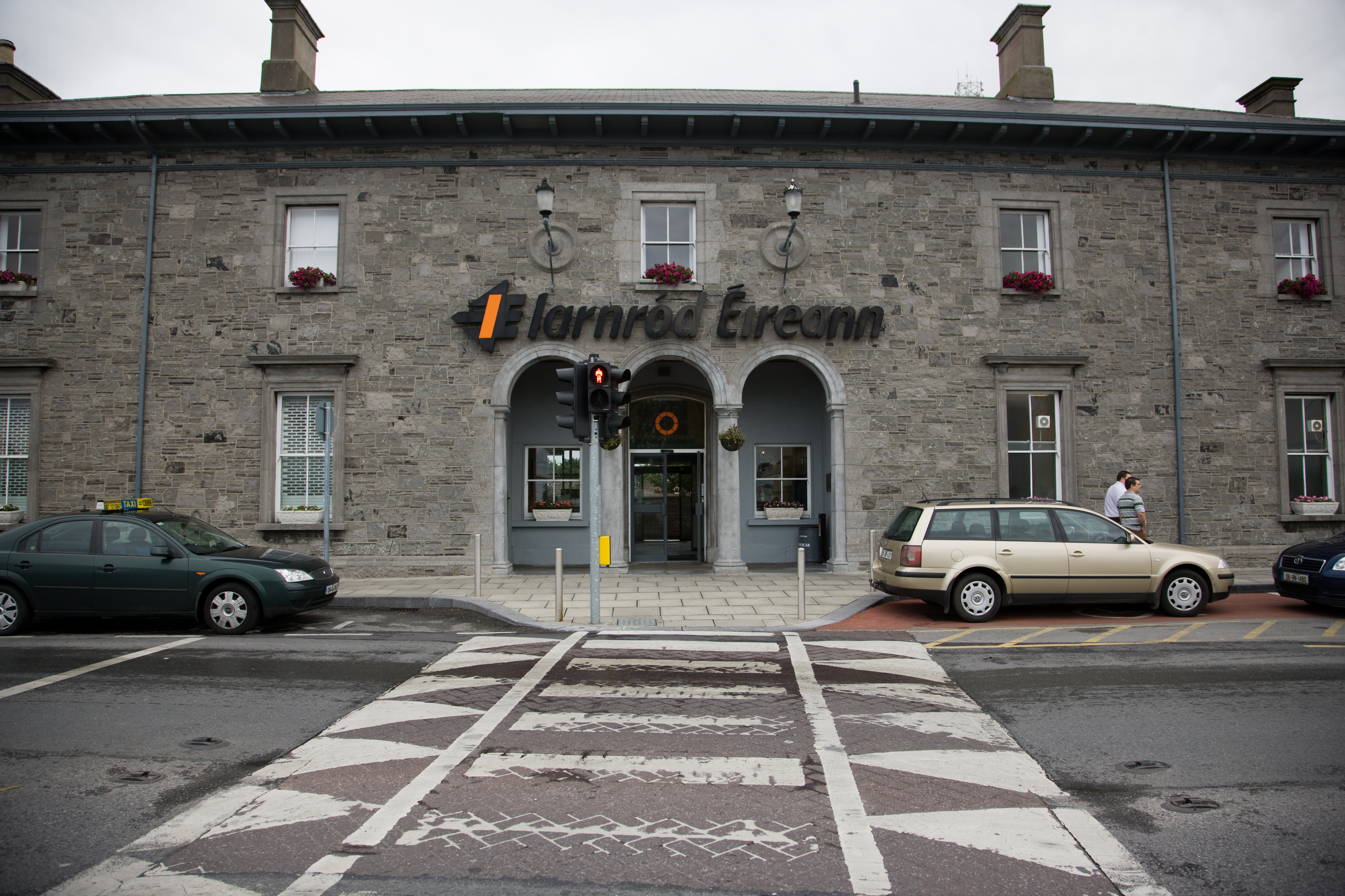 Здание станции Атлон